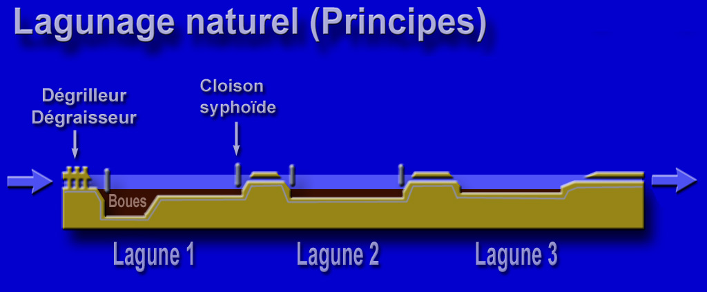 schéma illustrant le principe du lagunage naturel